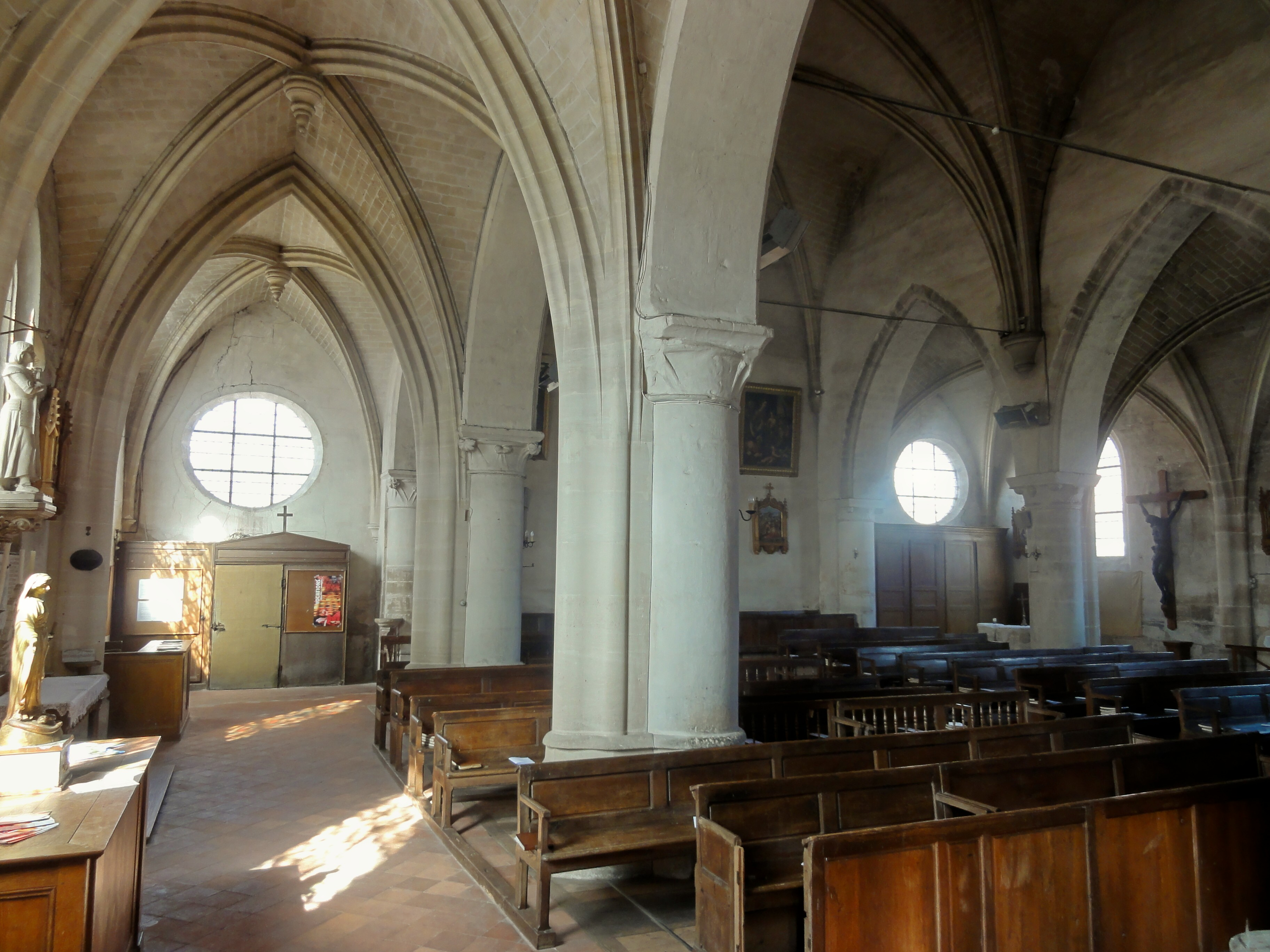 Nef ; vue depuis l'angle sud-est.